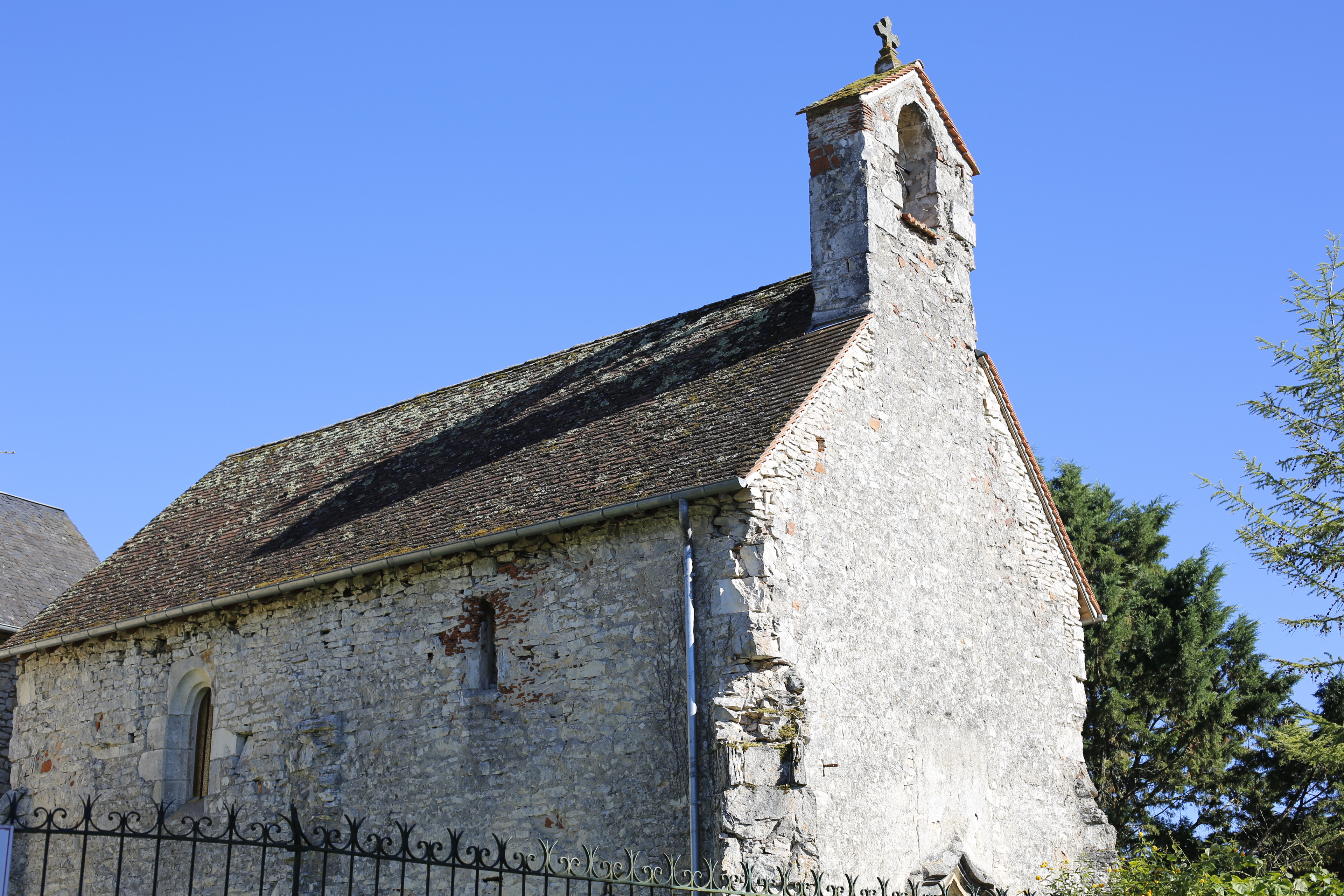 Chapelle Saint-Roch à Floirac. .